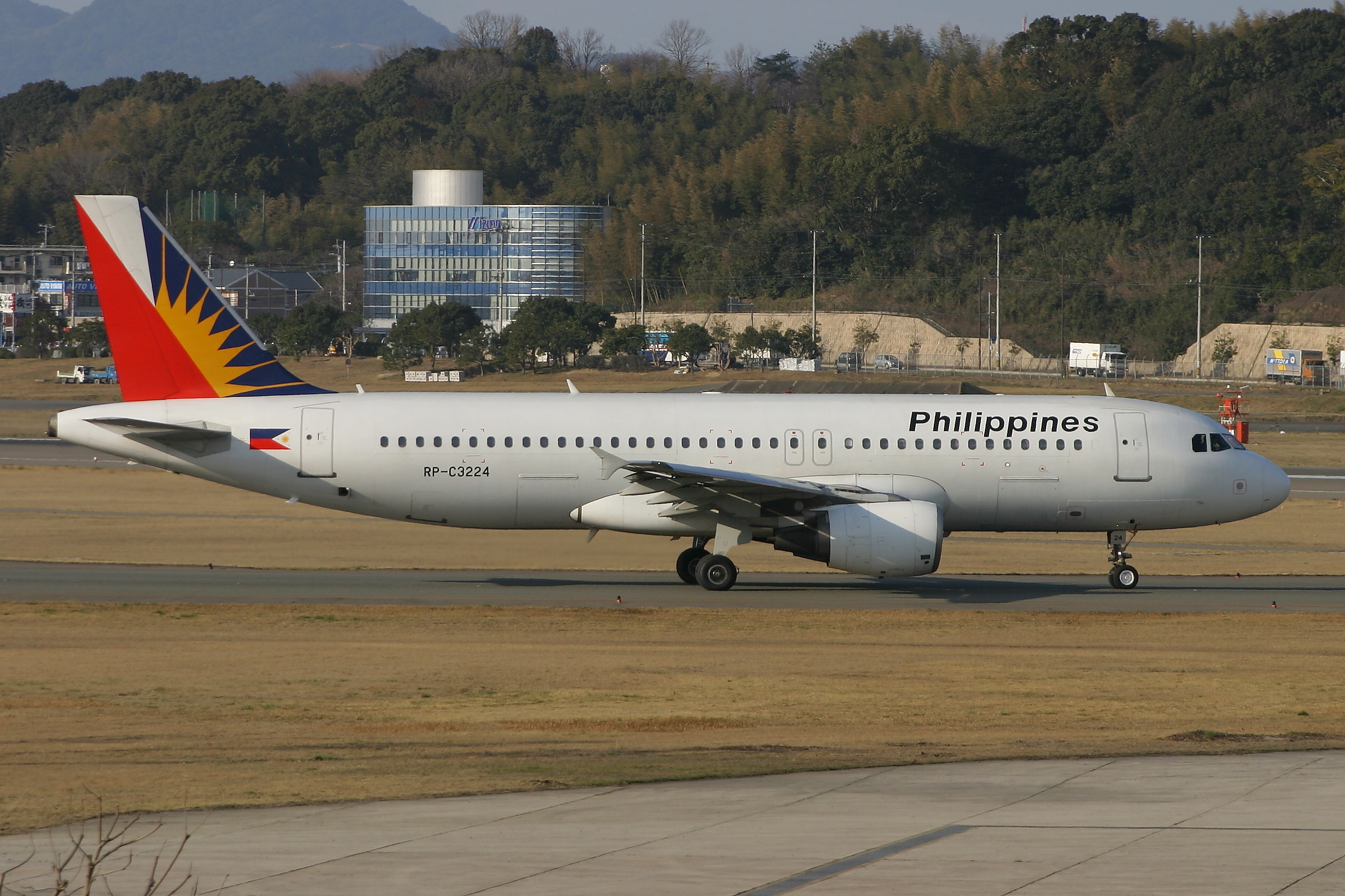 フィリピン航空 エアバス A320 福岡空港